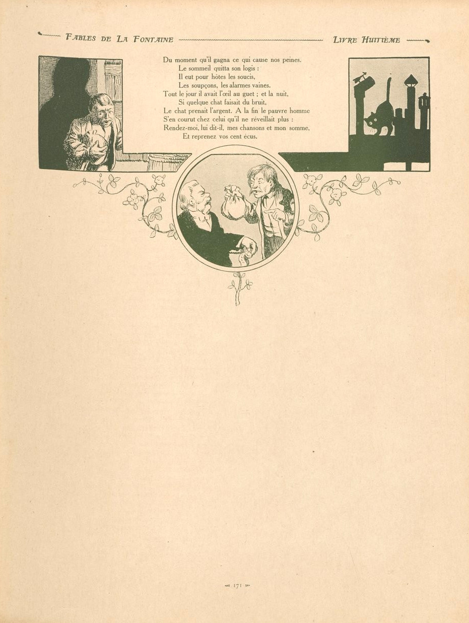 Fables de La Fontaine illustrées par Benjamin Rabier : Le savetier et le financier (fin).